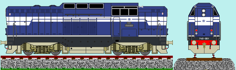 2141 series locomotive